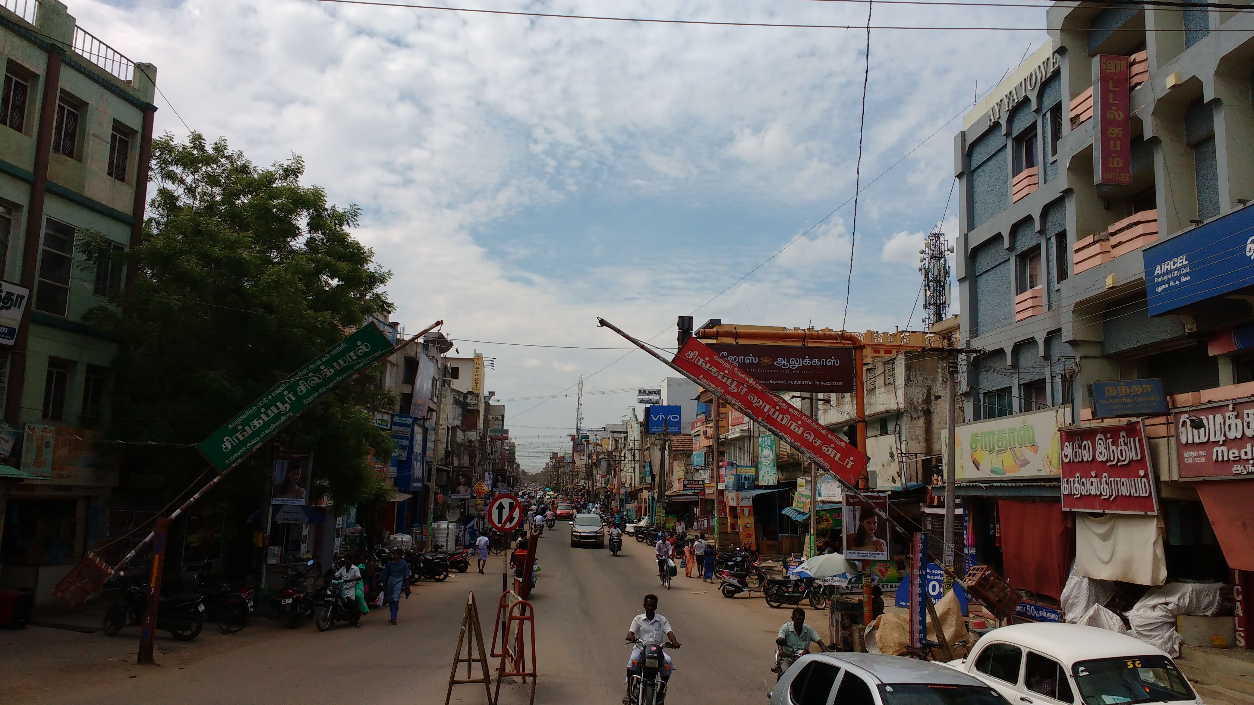 கீழ ராஜ வீதி புதுக்கோட்டை